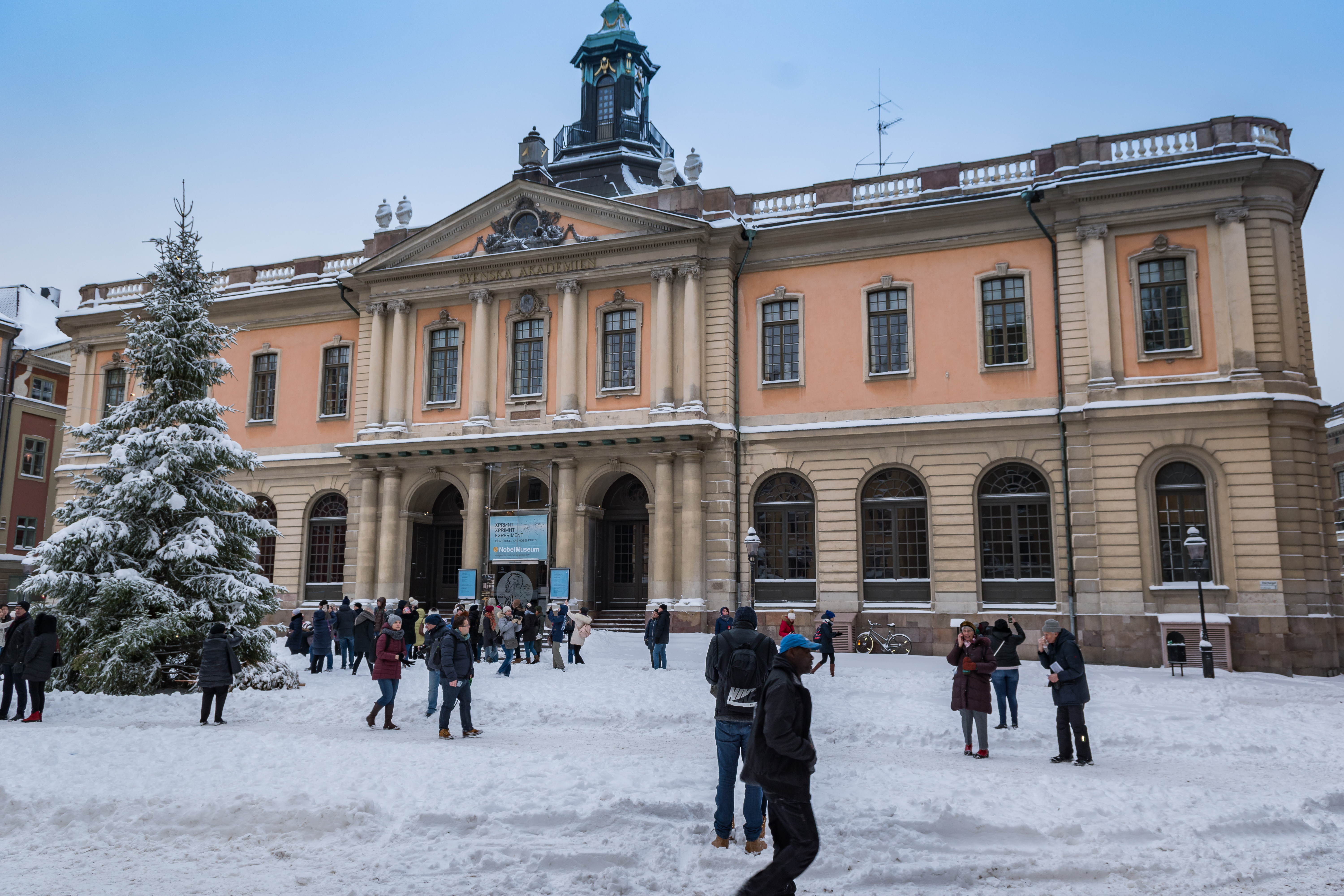 Stockholm Nobelpreis Museum